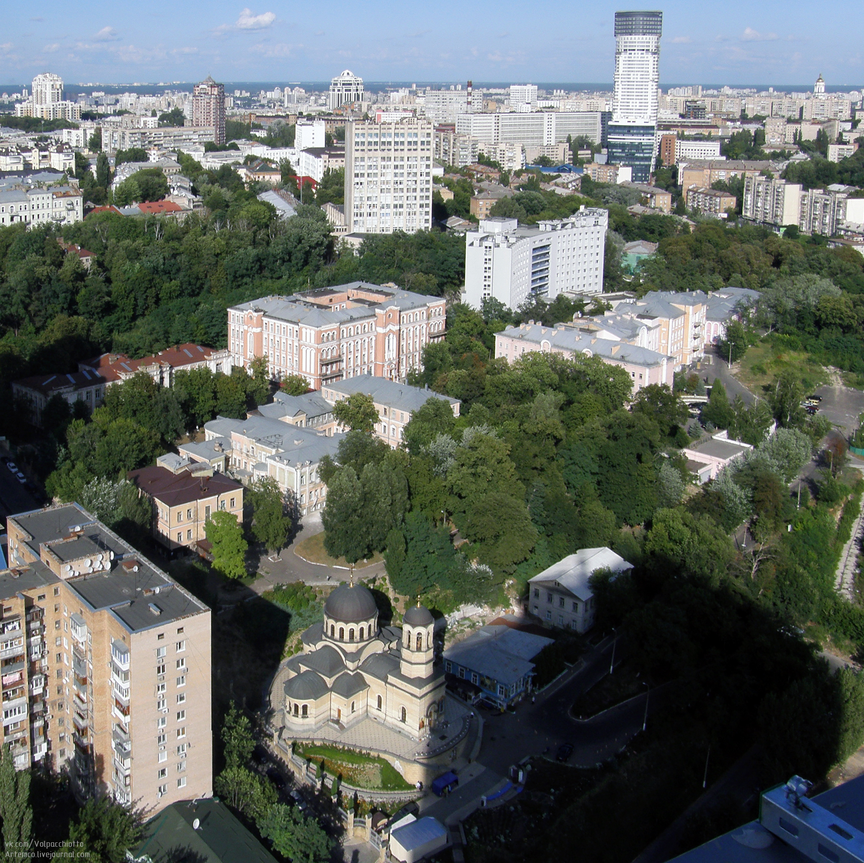 Александровская больница